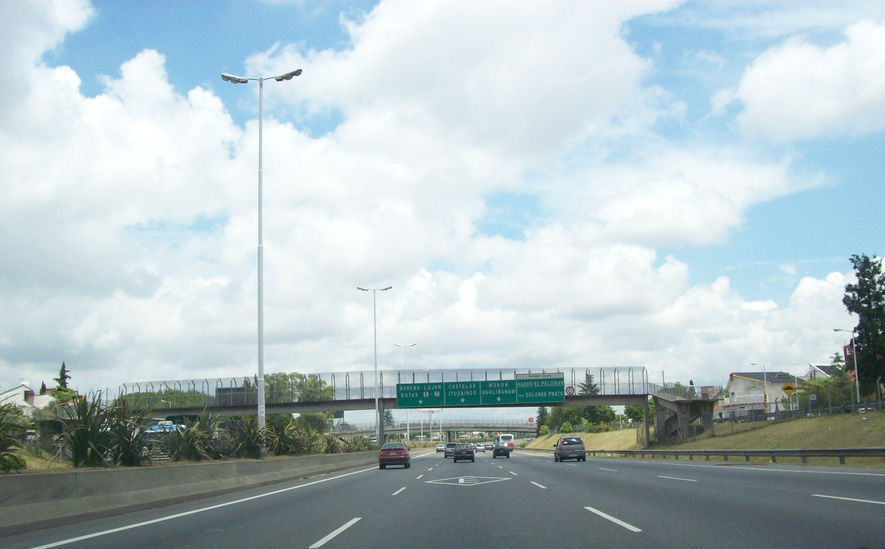 Acceso Oeste a la Ciudad de Buenos Aires en Haedo (km 17).